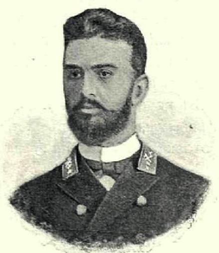 Вільгельм Аўгуставіч Срока